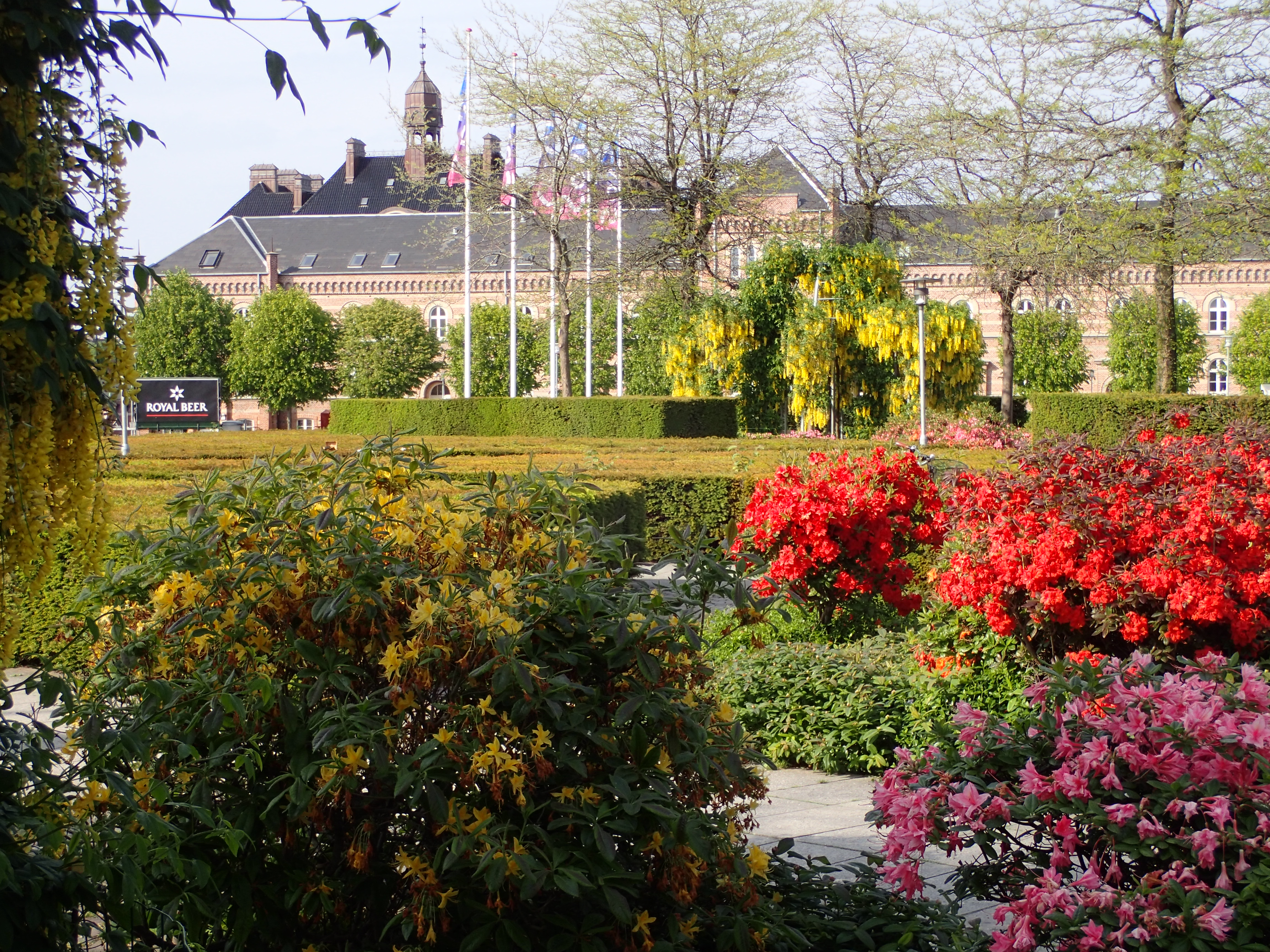 Musikhusparken i fuldt flor tidlig juni måned. Udsigt til Musikskolen og toppen af Tinghuset.